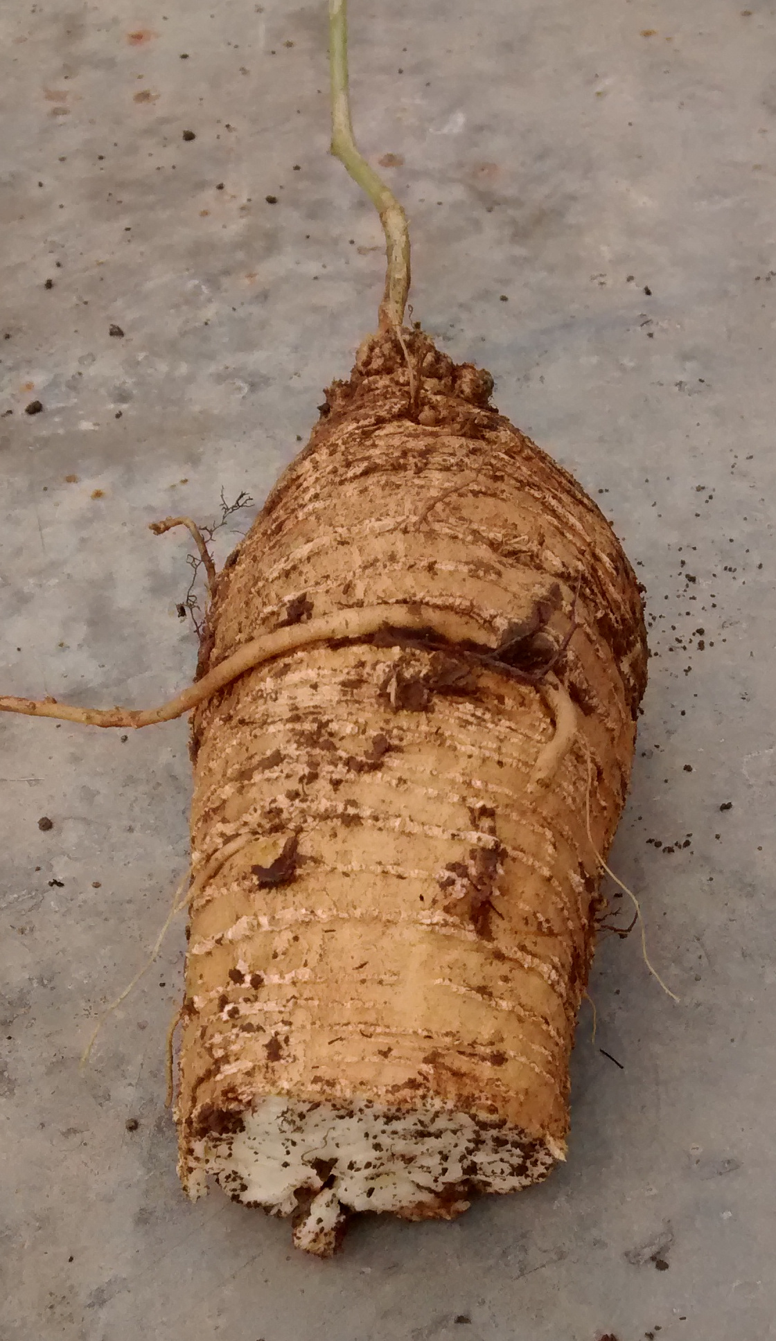 Bryonieae - Zaunrübenwurzel